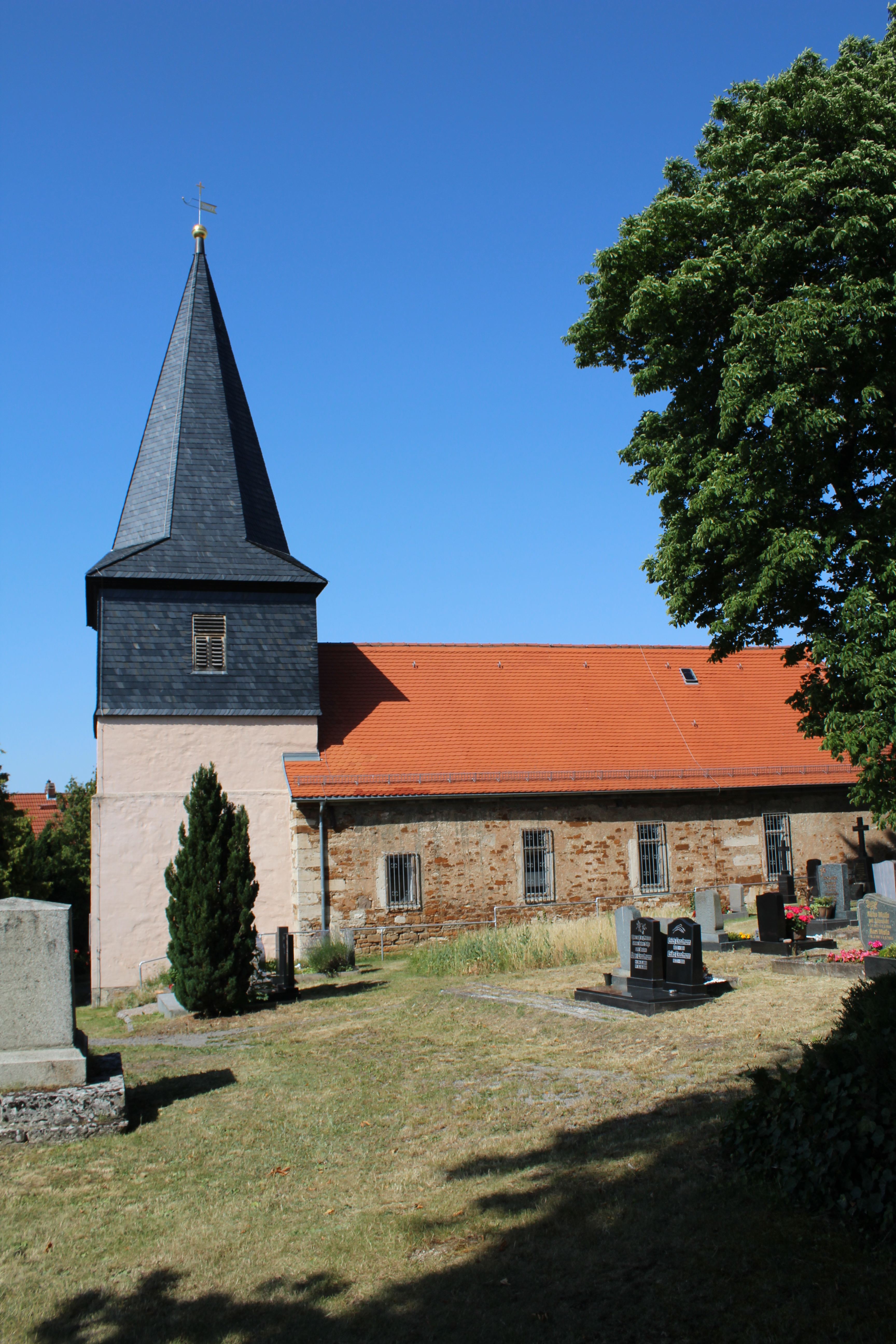 St. Martini, Unstrut-Hainich-Kreis, Thüringen, Deutschland